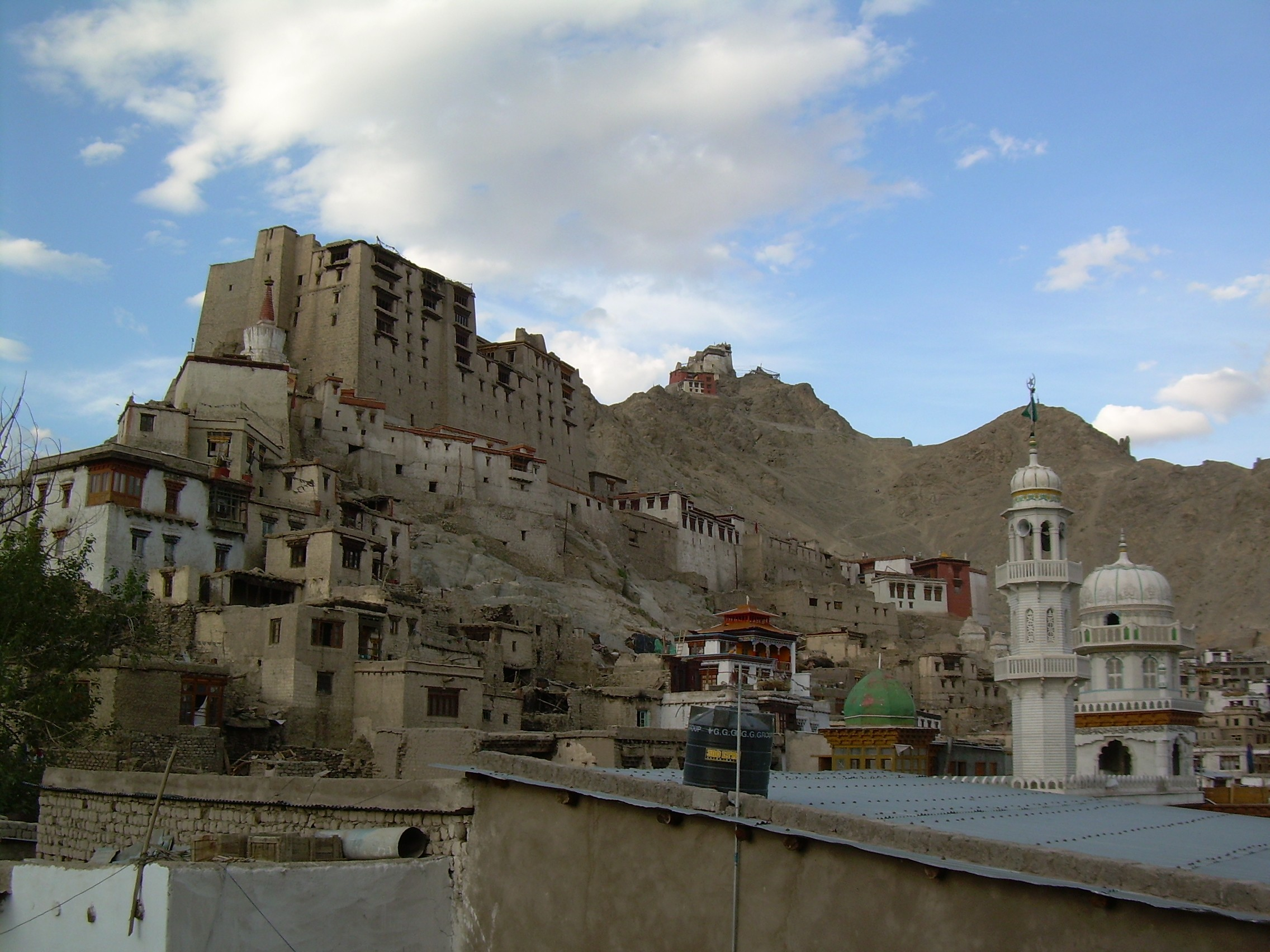 לה רישיון נוצר על ידי משתמש:מוטי